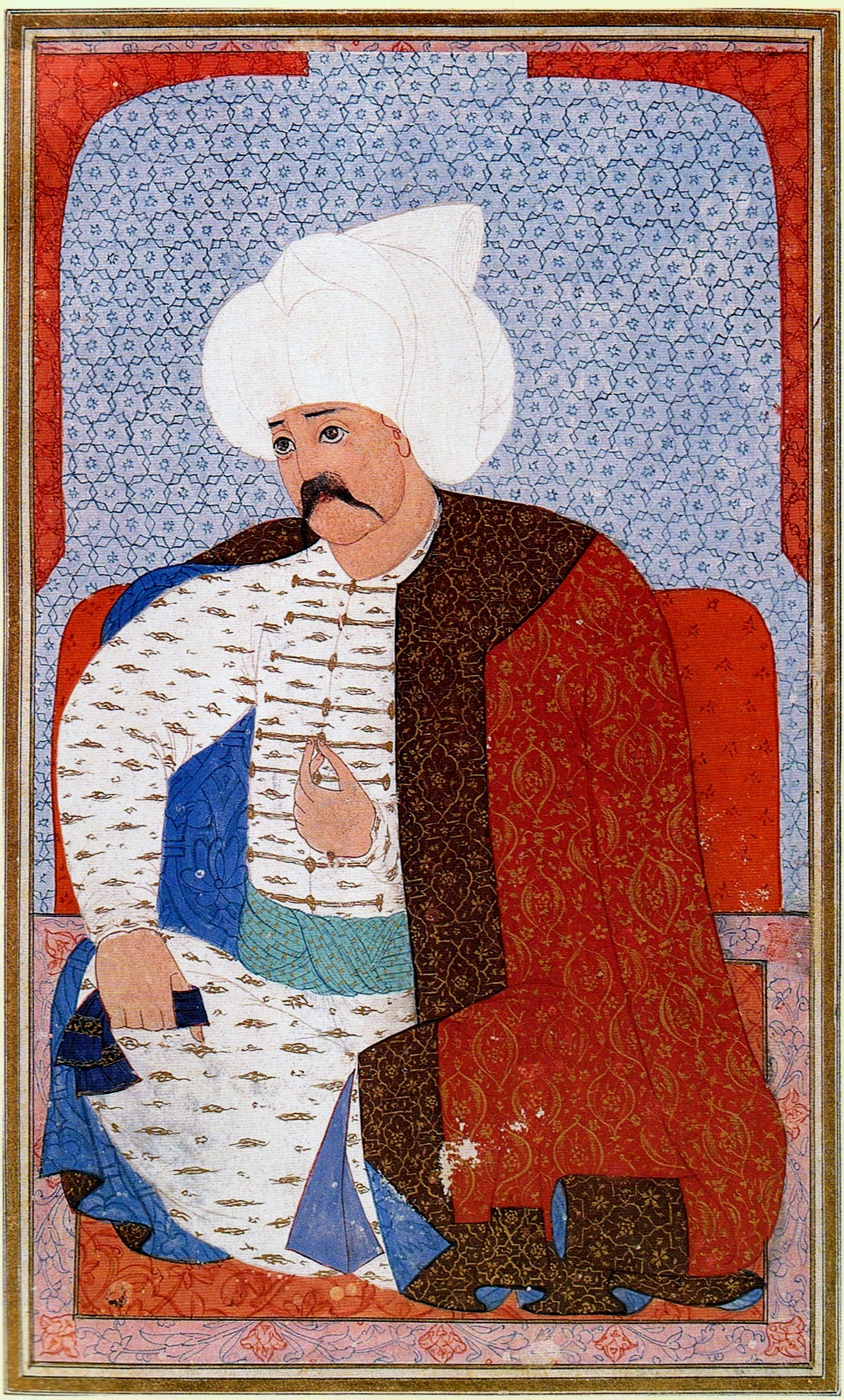 Selim I., osmanische Miniatur, gemalt von Nakkaş Osman.